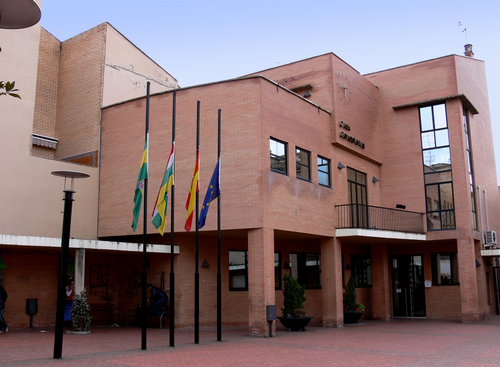 Ayuntamiento de Pradejón (La Rioja, España)